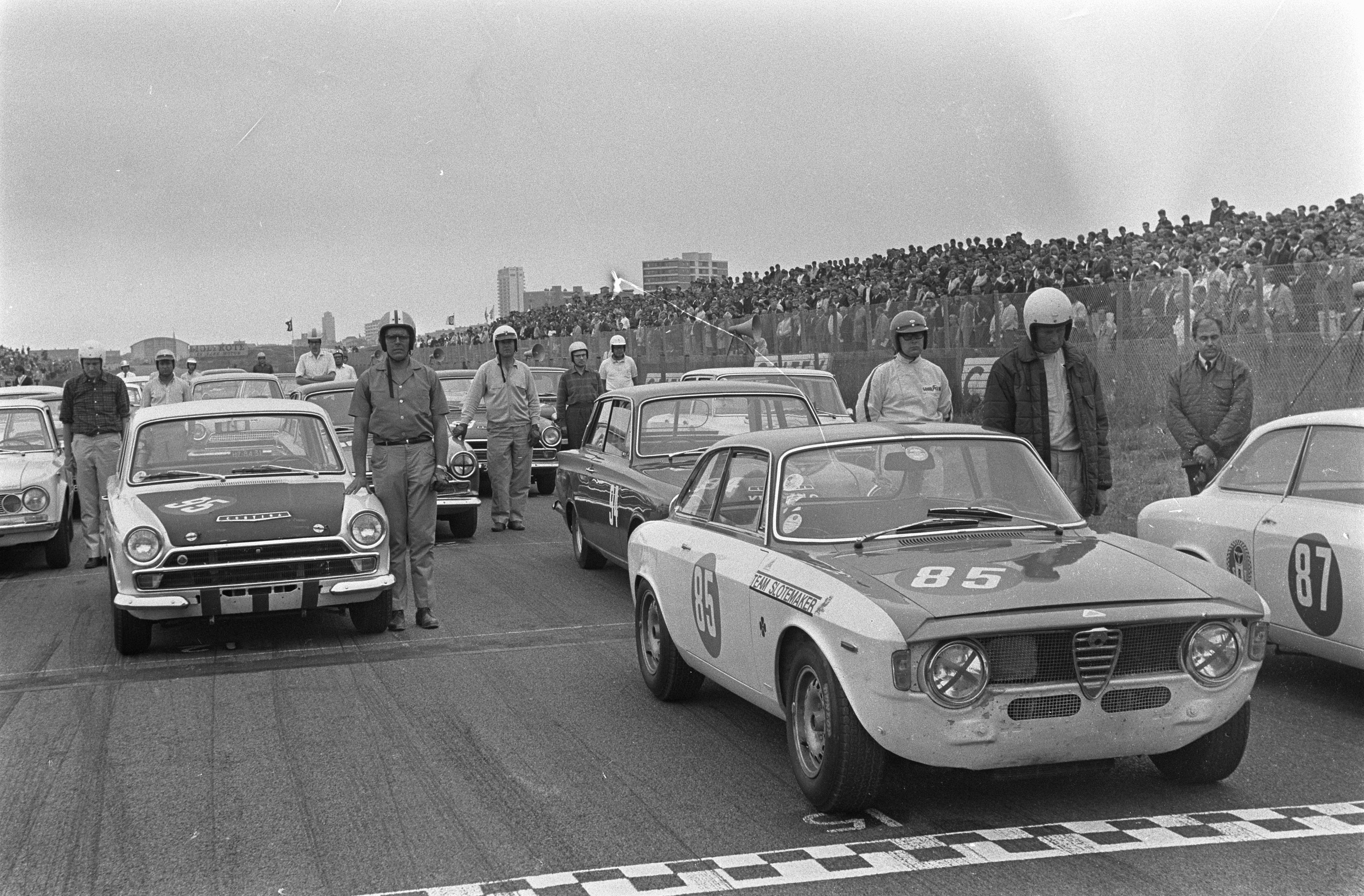 Collectie / Archief : Fotocollectie Anefo Reportage / Serie : [ onbekend ] Beschrijving : Grote Prijs van Zandvoort Formule II . Een minuut stilte ter nagedachtenis aan Wim Loos Datum : 30 juli 1967 Trefwoorden : auto's Fotograaf : Evers, Joost / Anefo Auteursrechthebbende : Nationaal Archief Materiaalsoort : Negatief (zwart/wit) Nummer archiefinventaris : bekijk toegang 2.24.01.05 Bestanddeelnummer : 920-5533